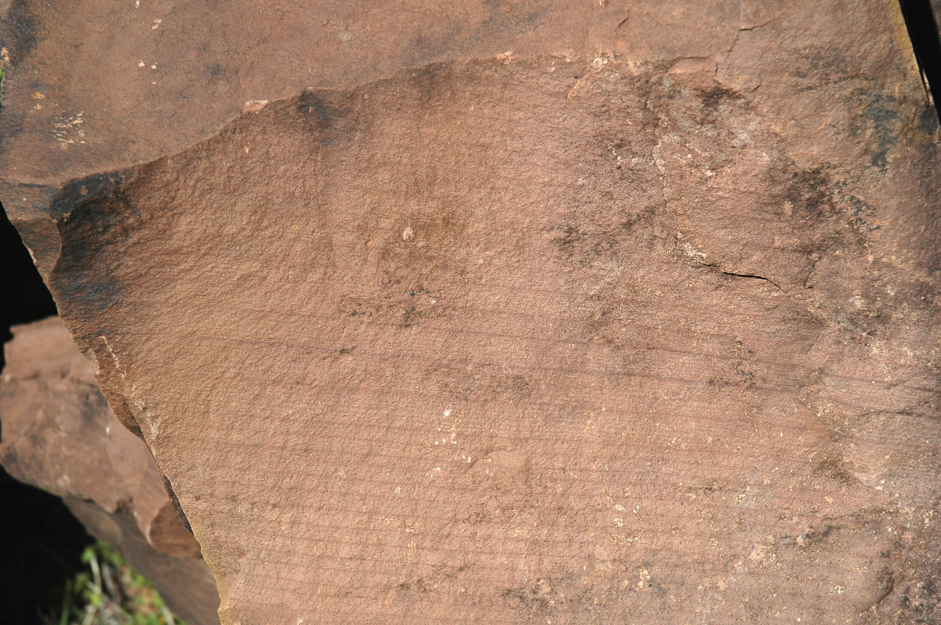 Tidalites (Elatina Formation, Néoprotérozoïque , Australie)